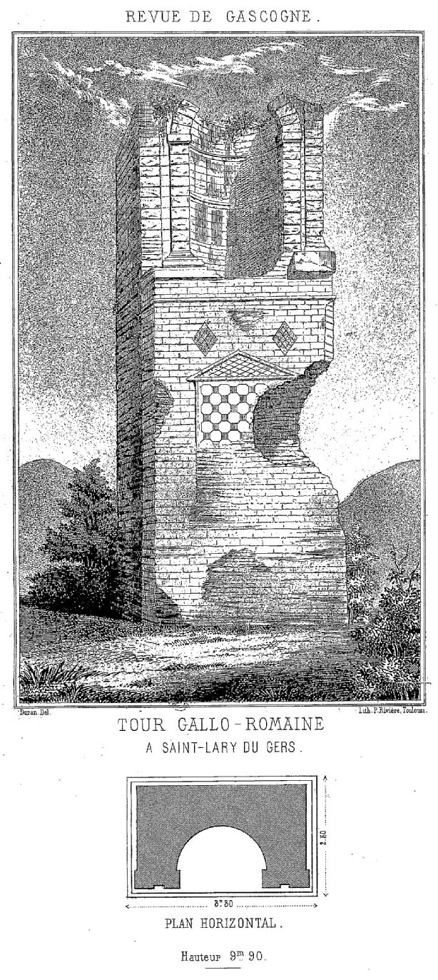 Pile romaine de Saint-Lary, Gers, France. Illustration de la Revue de Gascogne, tome XXIII, 1882